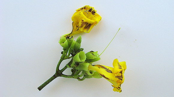 CC-BY CalPhotos Alex V. Popovikin Entre Rios, Bahía, Brasil More details